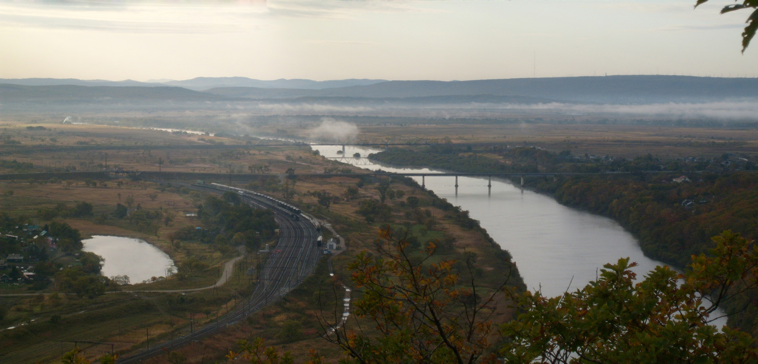 река Раздольная близ посёлка Барановский